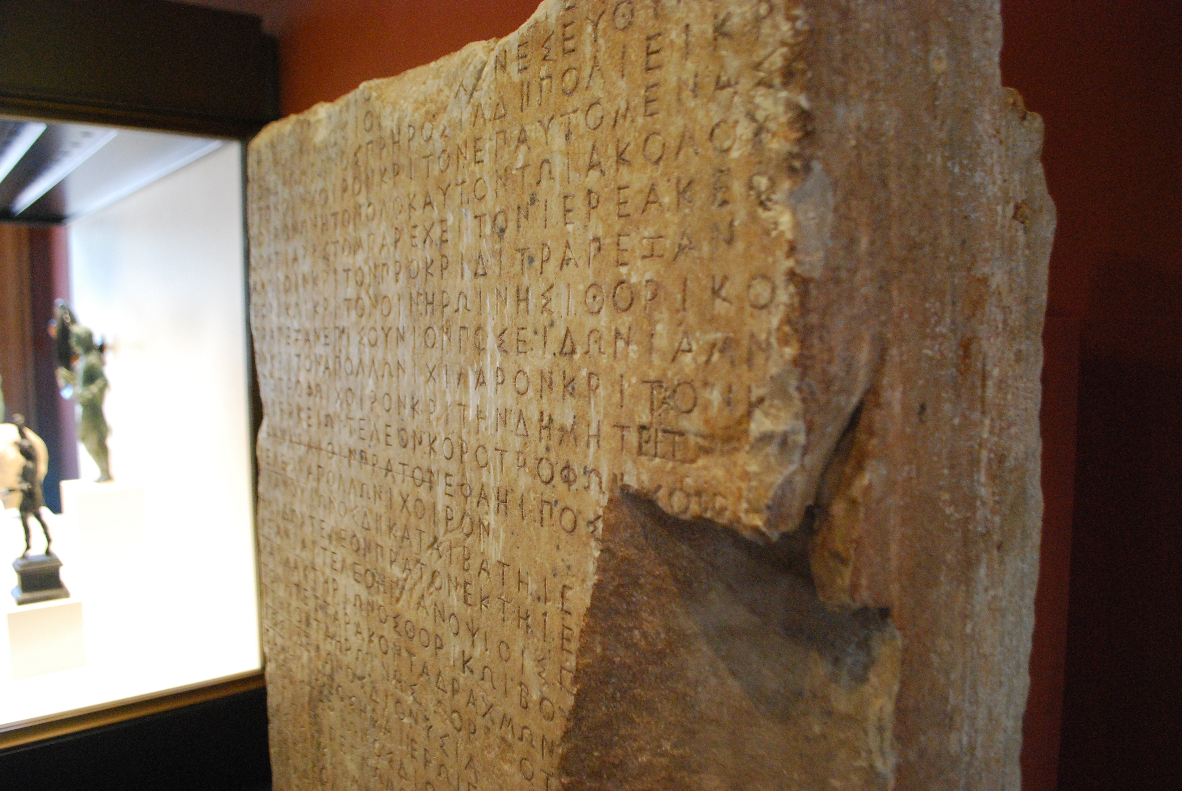 Antiquities